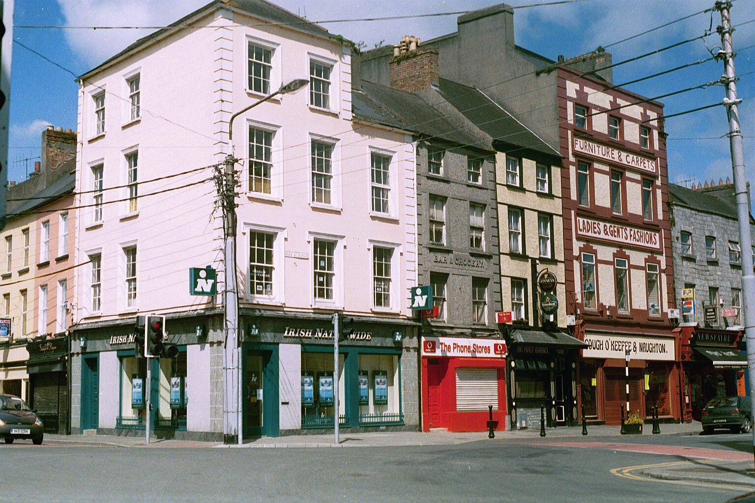 nenagh